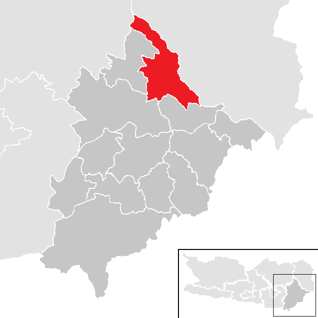 Bezirk Völkermarkt